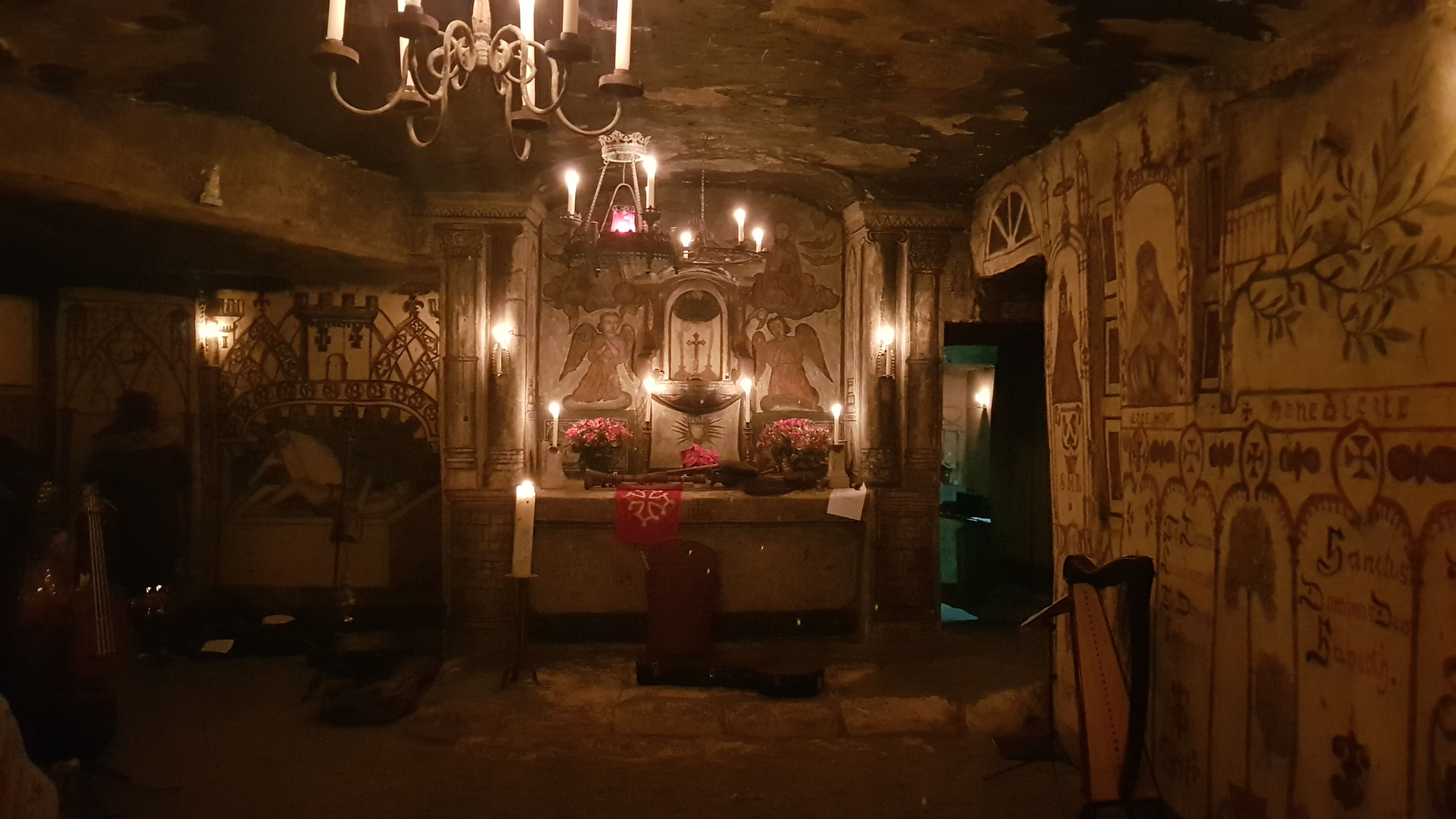 kapel in de Geulhemmergroeve, Geulhem, Nederland